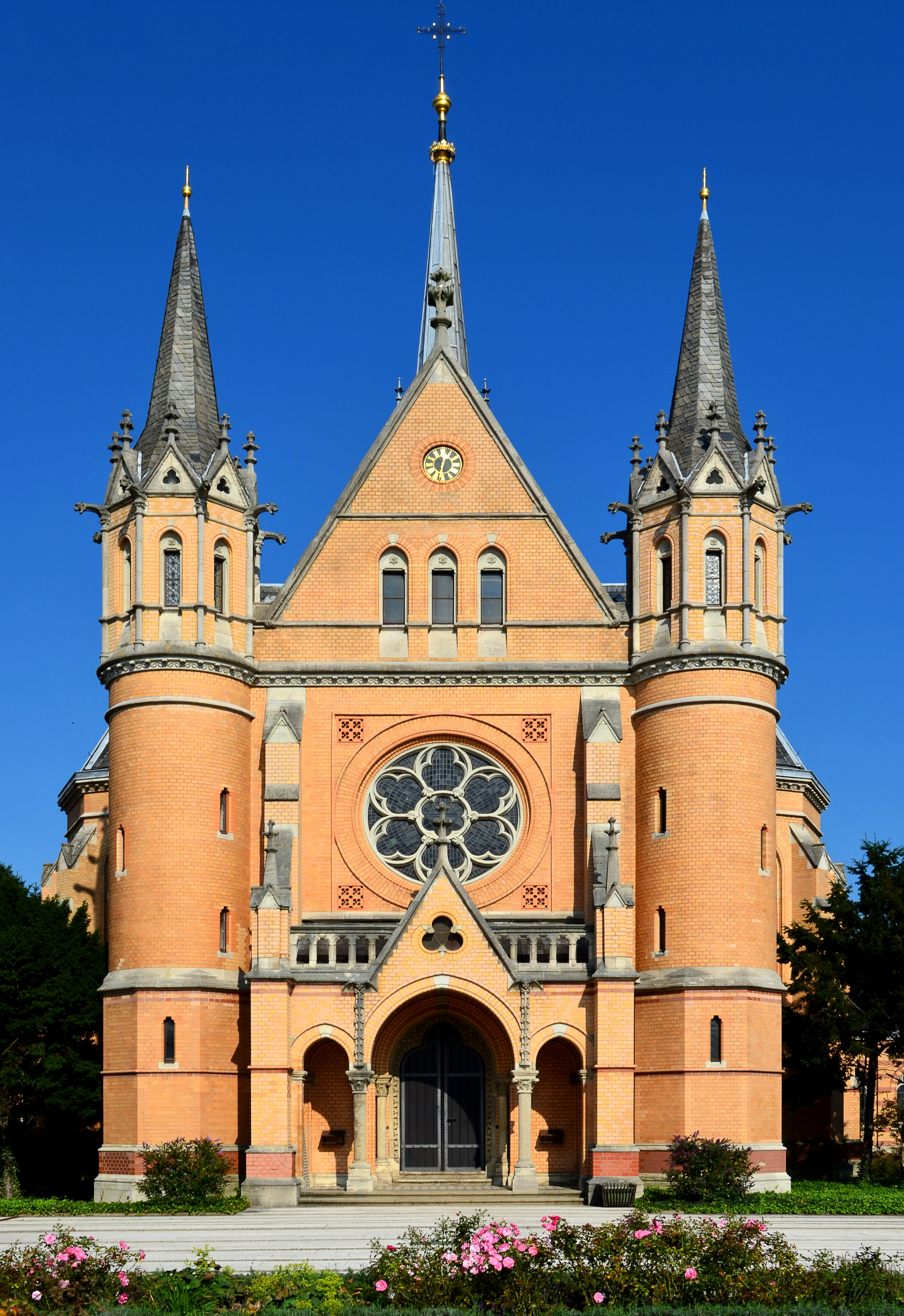 Hauptfriedhof Braunschweig: Eingansgseite der neogotischen Friedhofskapelle von Ludwig Winter. Ansicht von Süden.